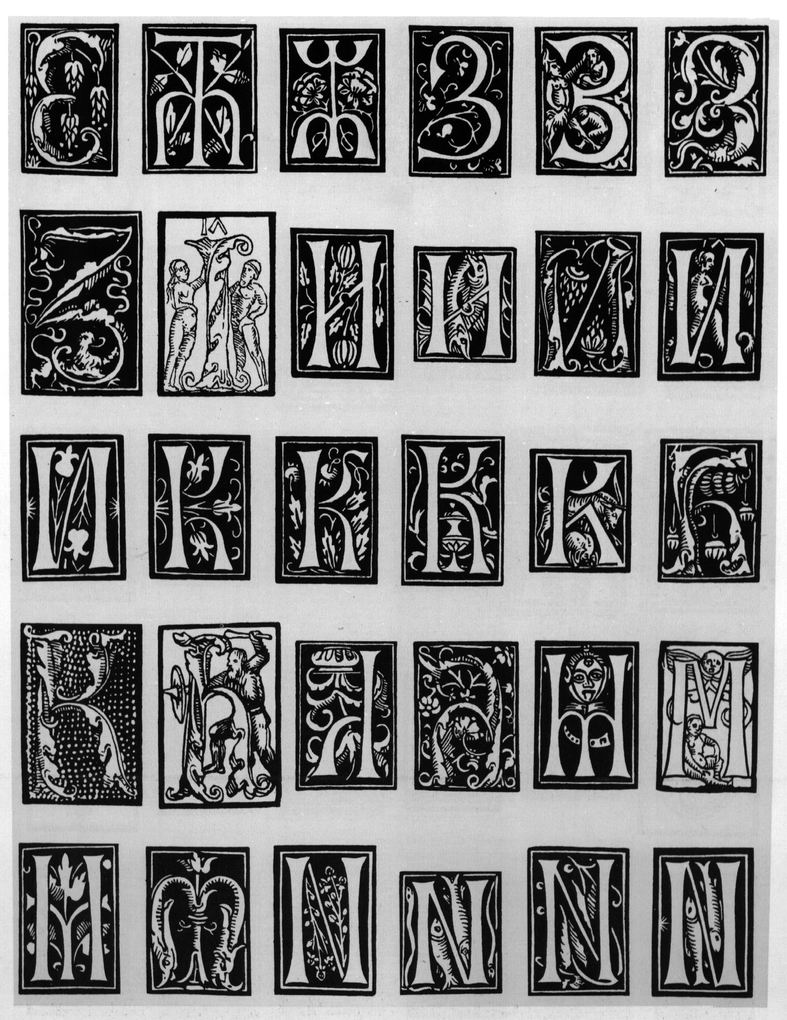 Скорина. Инициалы из пражских изданий: Е-Н